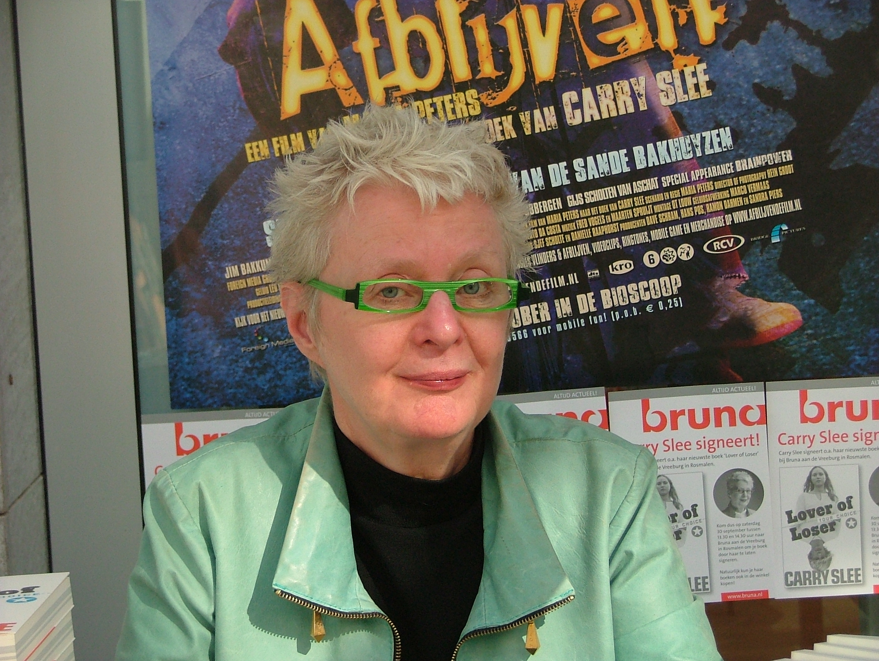 Carry Slee bij een signeeractie in Rosmalen Eigen materiaal Geert C. Smulders. Foto is genomen met haar toestemming. Licensing Categorie:Wikipedia:Afbeeldingen/Gebruiker:Hsf-toshiba